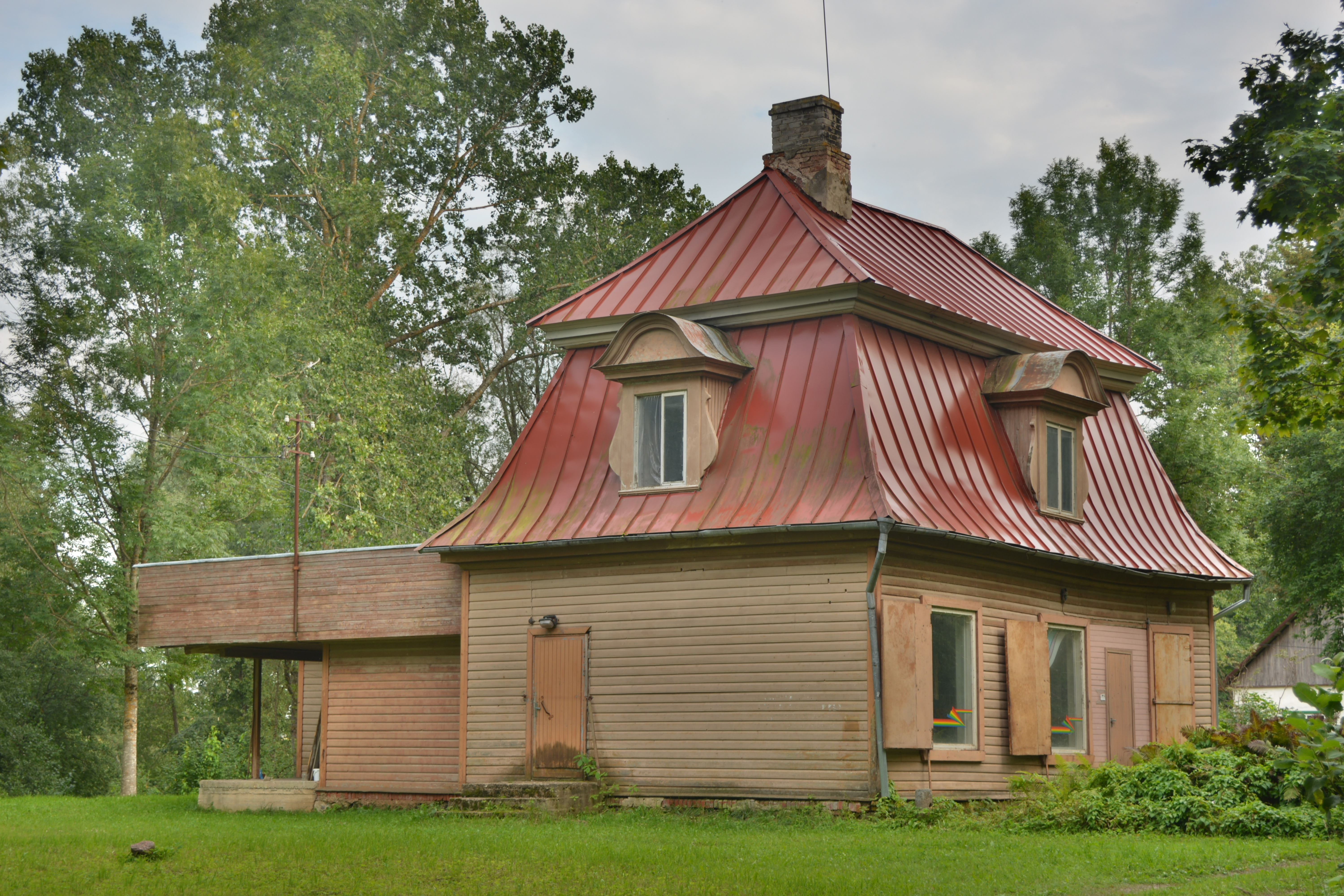 Rasina mõisa peahoone tiibehitis